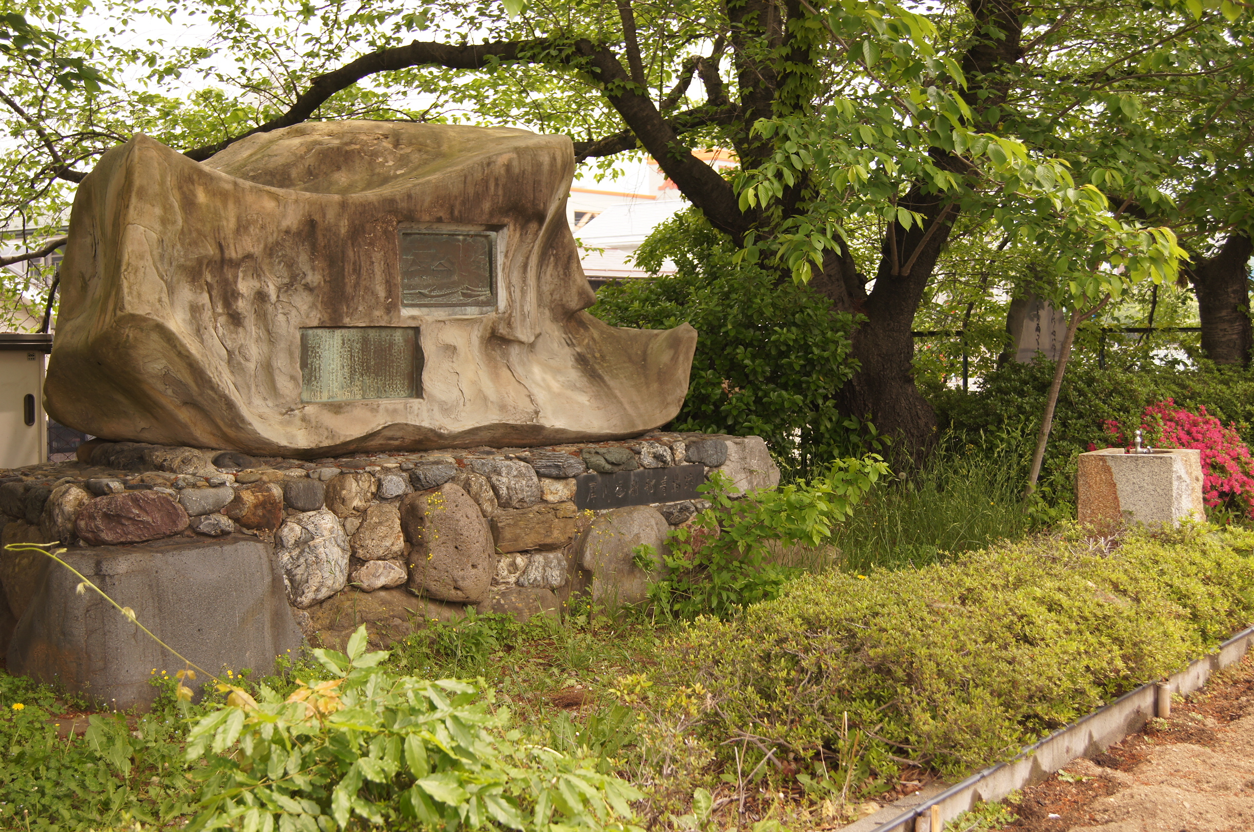 長野県松本市巾上の女鳥羽川と道路の間にある犀川通船碑